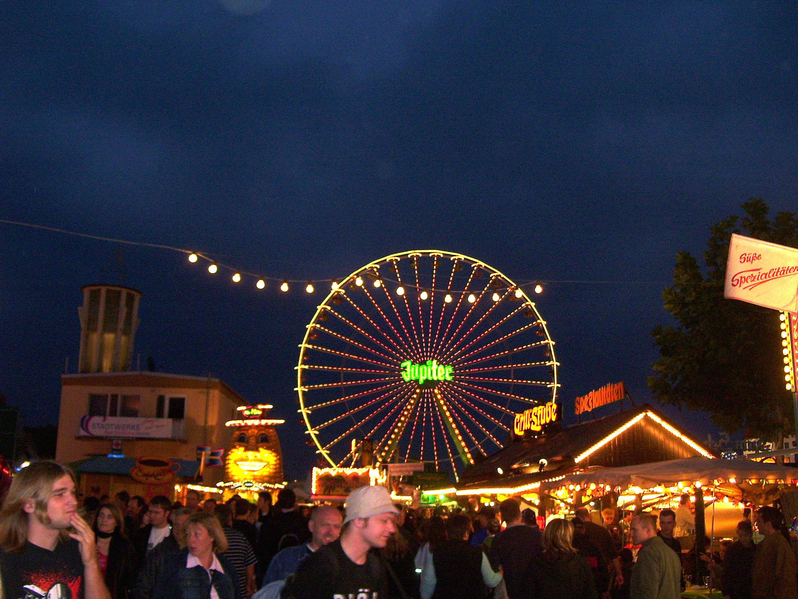 Wurstmarkt am 8.9.2007 bei Nacht